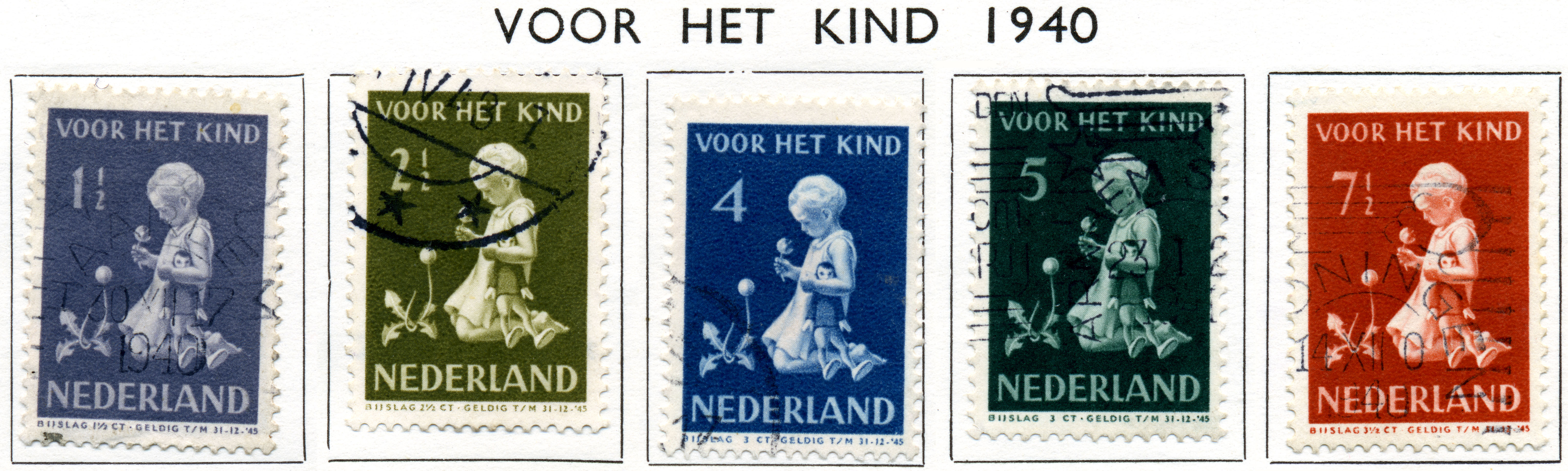 Kinderzegels (1940) Kind met bloemen. NVPH nr 374-378. Ontwerper Dirk van Gelder